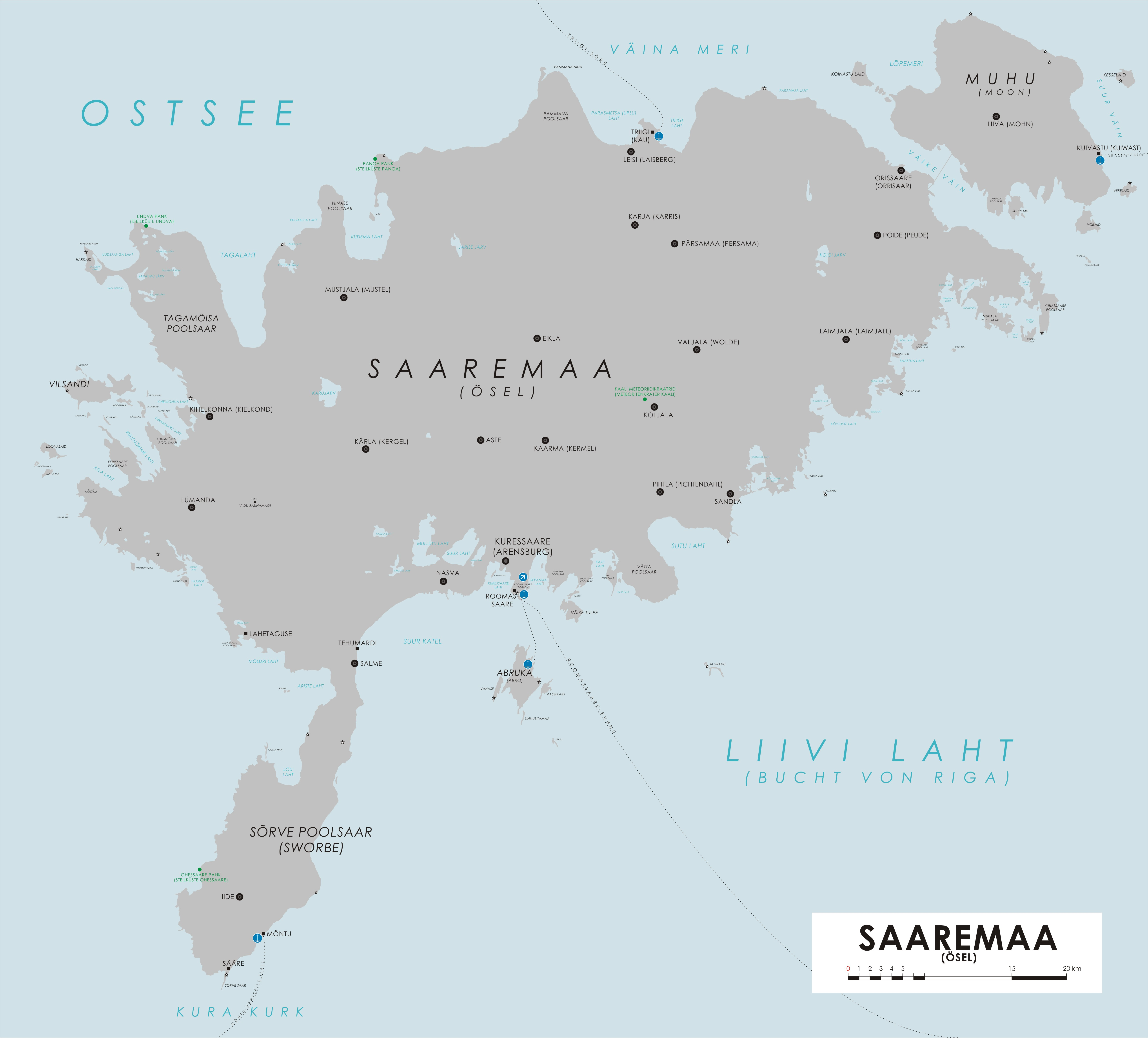 Karte der Insel Saaremaa (Ösel) (Estland)